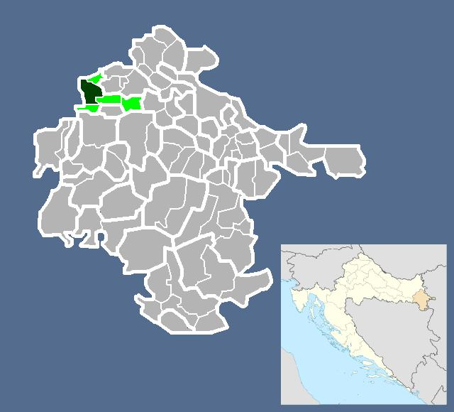 Српски (ћирилица): Вуковарско-сремска жупанија- Маркушица.